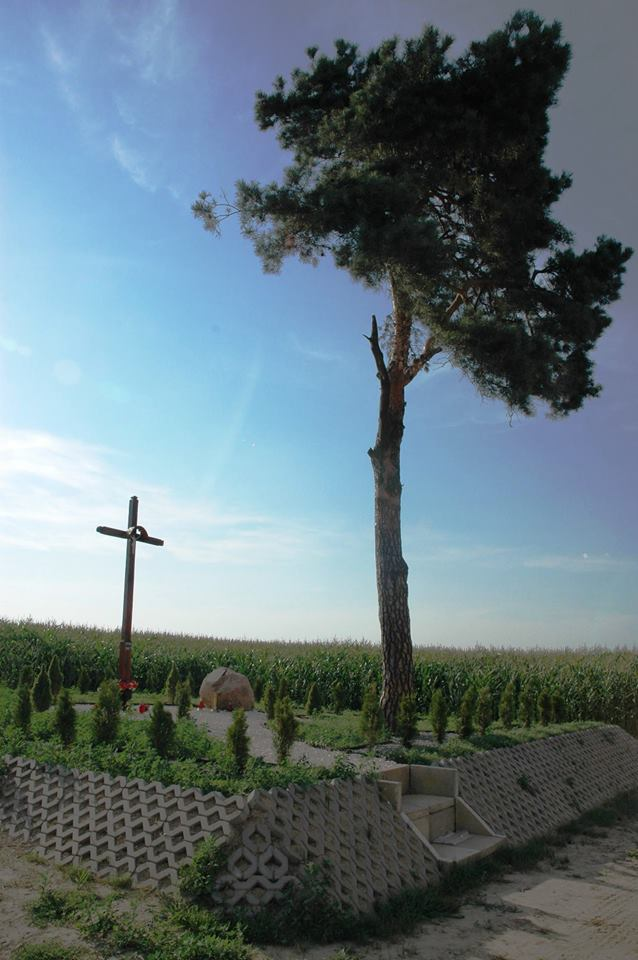 cholerny